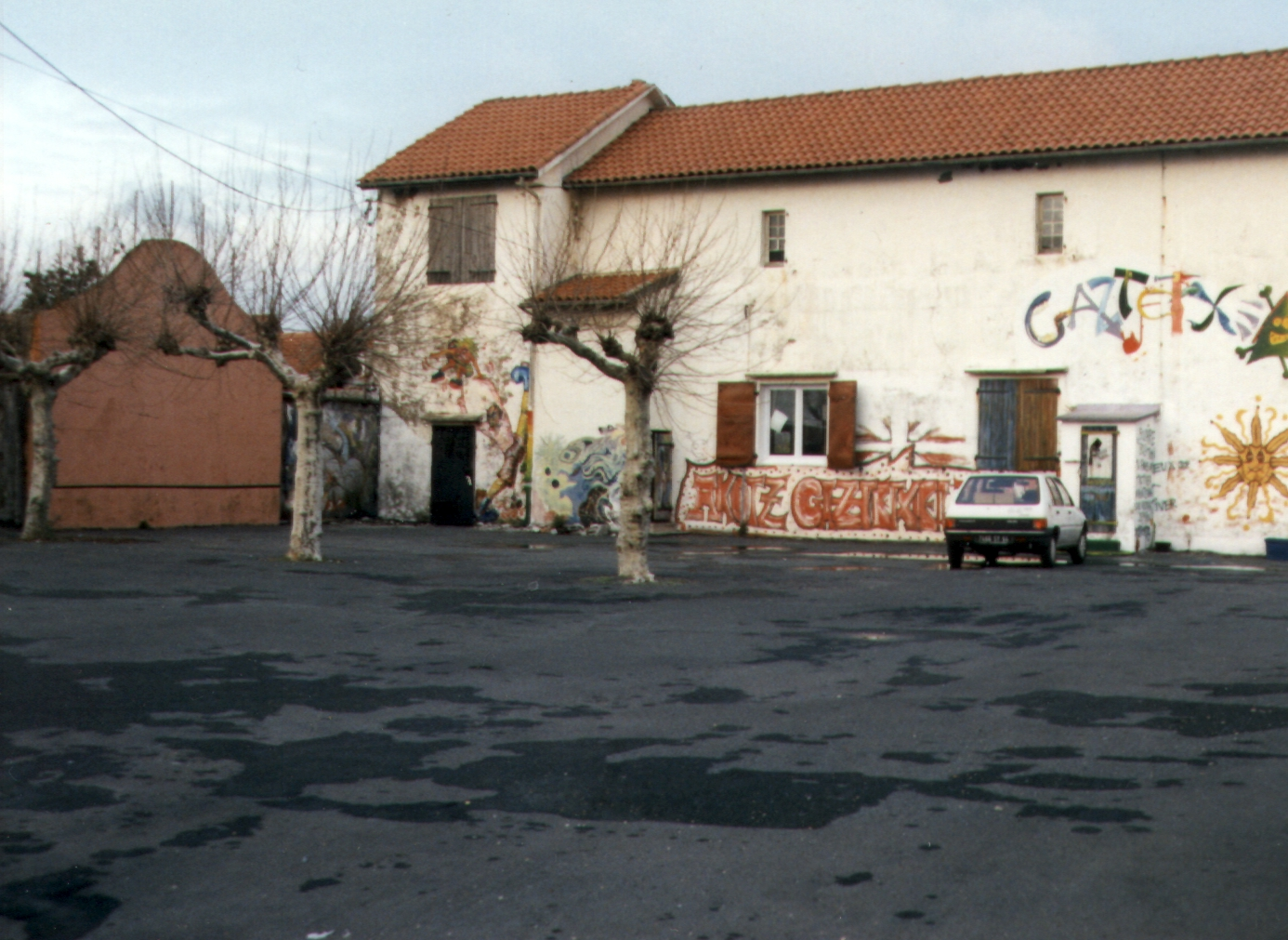 Le Gaztetxea ou Maison des jeunes en 1997